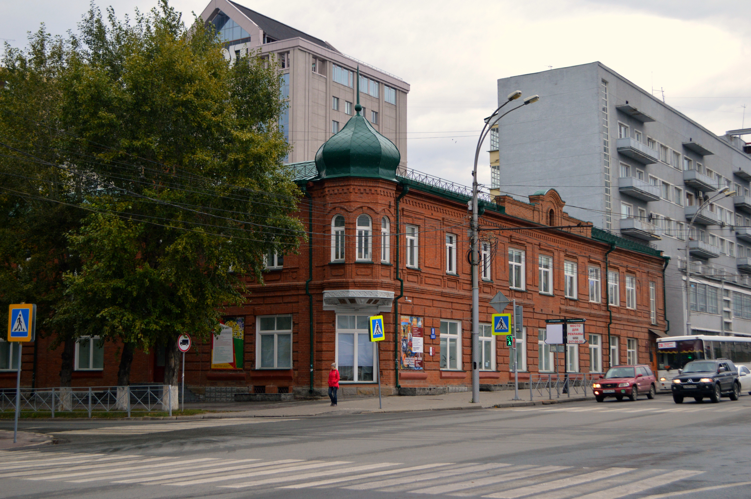 Дом Ф.Д. Маштакова: Красный проспект, 9(улица Свердлова, 15), Центральный район, Новосибирск, Новосибирская область